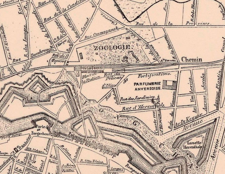 Extrait plan de la ville d'Anvers édité en 1865 et réalisé par J. Van de Kerckhove avant l'ouverture du chemin de fer de Rotterdam (1854) et avant la modification des fortifications, et après l'ouverture du chemin de fer de Bruxelles à Anvers (1836) et l'ouverture du ZOO (1844). Il comprend la représentation de la station d'Anvers du chemin de fer de l'État et de ses abords près de la porte de Borgerhout. Elle comprend notamment un bâtiment qui donne sur la place de la station.